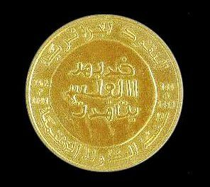 دينار ذهبي تحمل شعار الدولة الوهبية